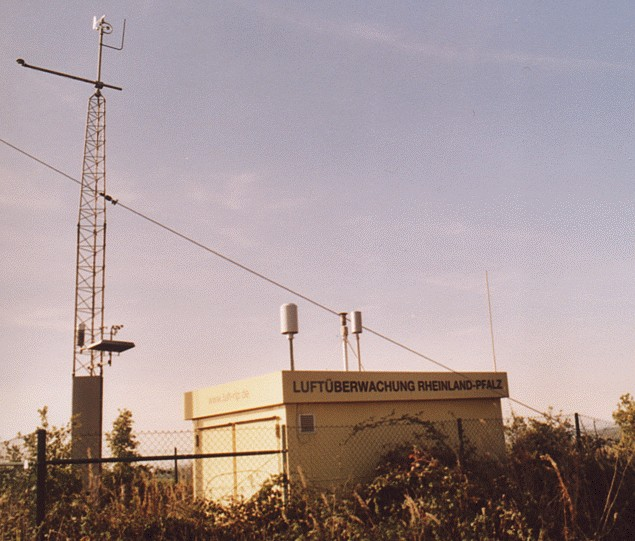 Luftmessstation Dunzweiler (ZentralesImmissionsMEmessNetz des Landes Rheinland-Pfalz – ZIMEN)